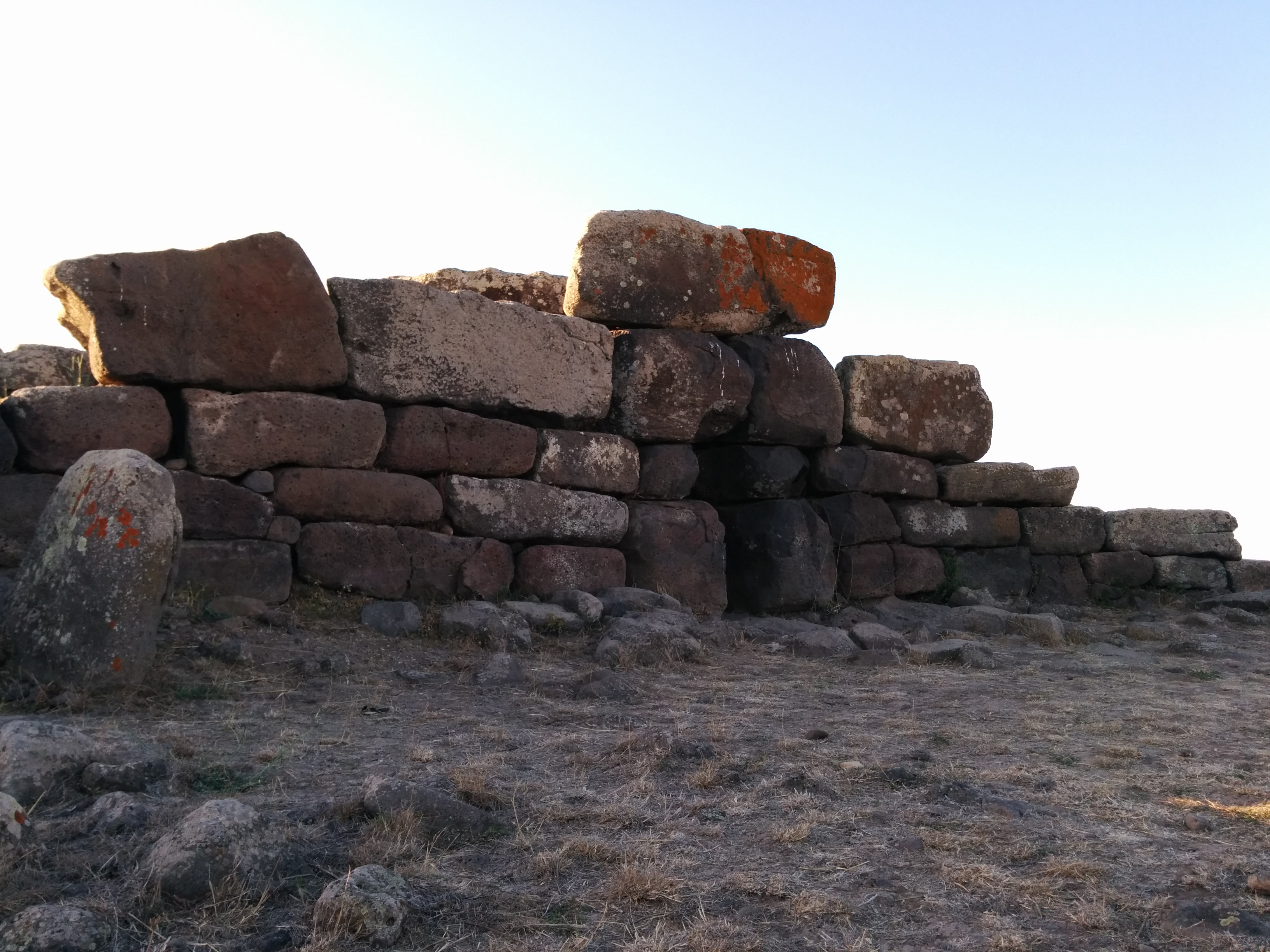 Tomba di Giganti di Sa Domu 'e S'Orcu - facciata